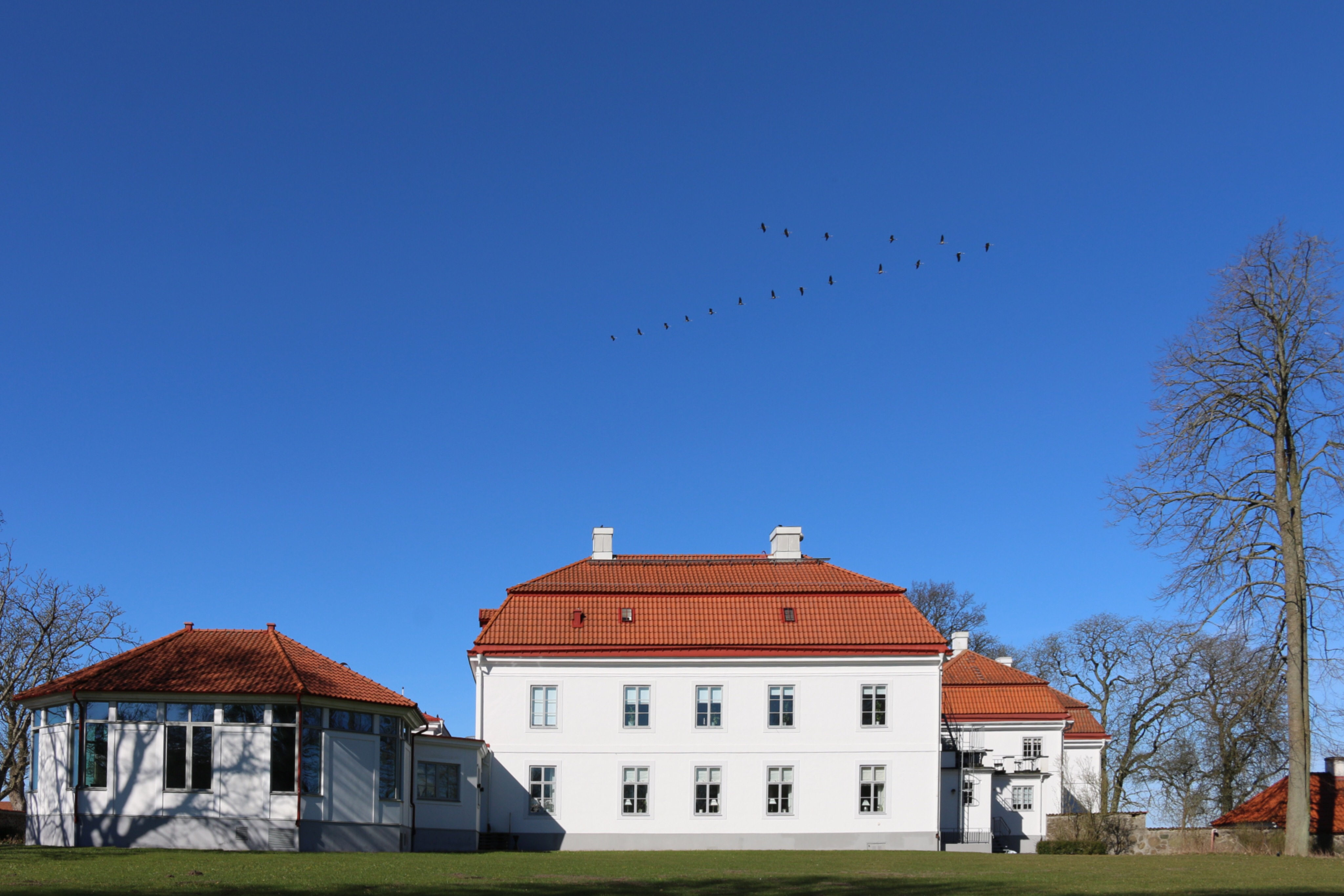 Bjärsjölagårds slott från parken.